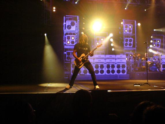 Rick Parfitt 2005 in Huttwil (Schweiz).